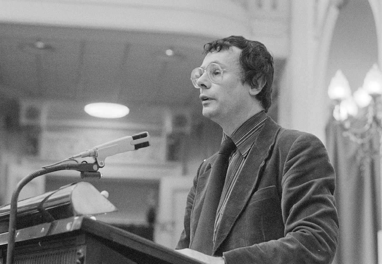 Tweede Kamer debat, interpellatie Kosto over Menten; Kosto aan het woord